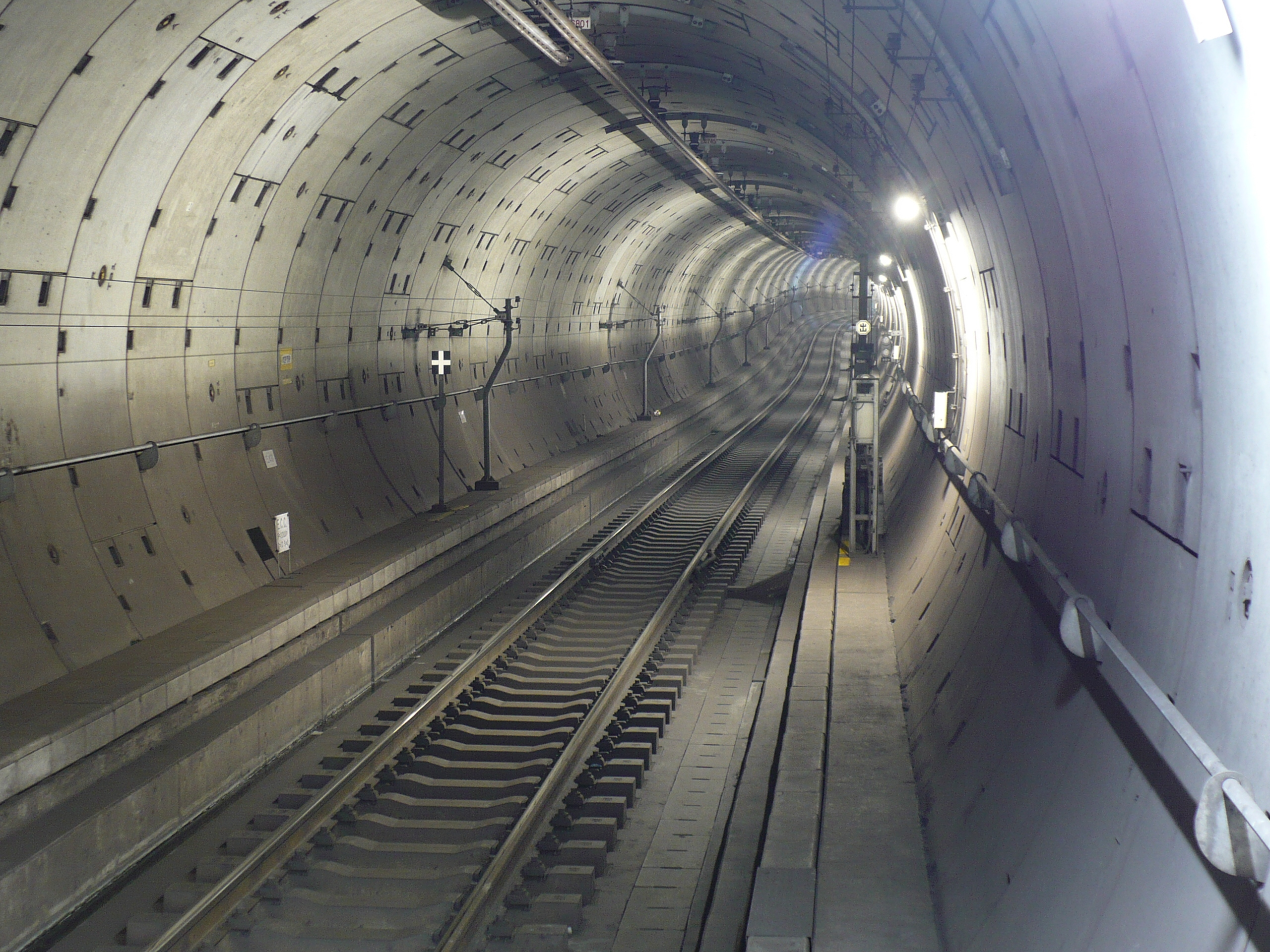 半蔵門線錦糸町駅のシールドトンネル